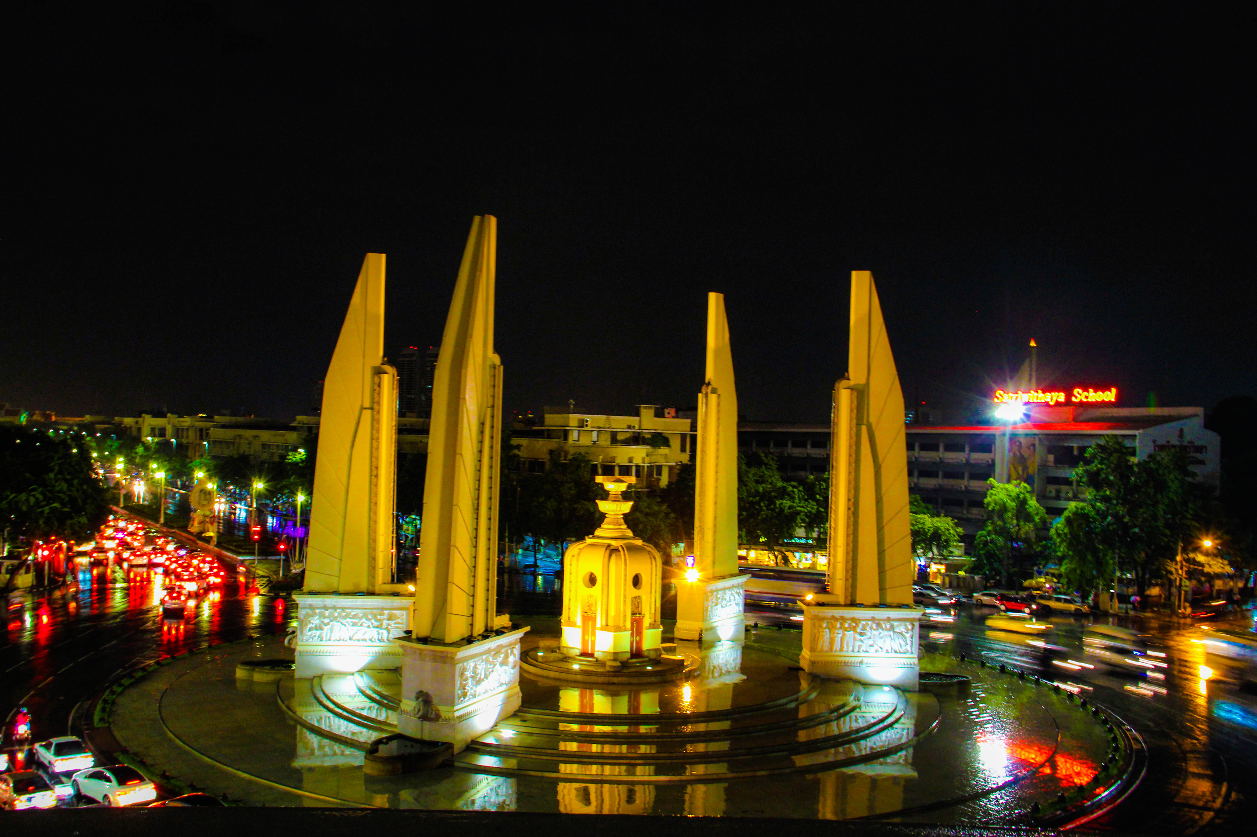 อนุสาวรีย์ประชาธิปไตย